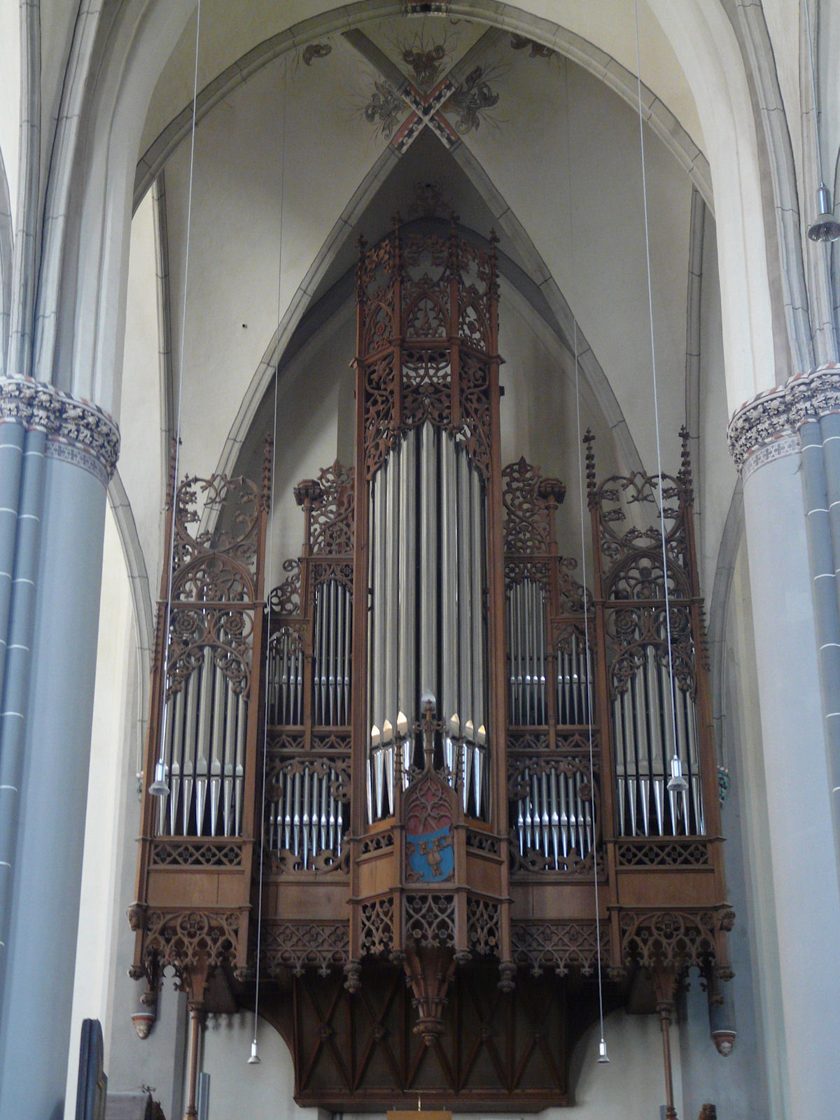 Sankt Nicolai, Kalkar, Nordrhein-Westfalen Church of Saint Nicholas, Kalkar, in North Rhine-Westphalia, Germany